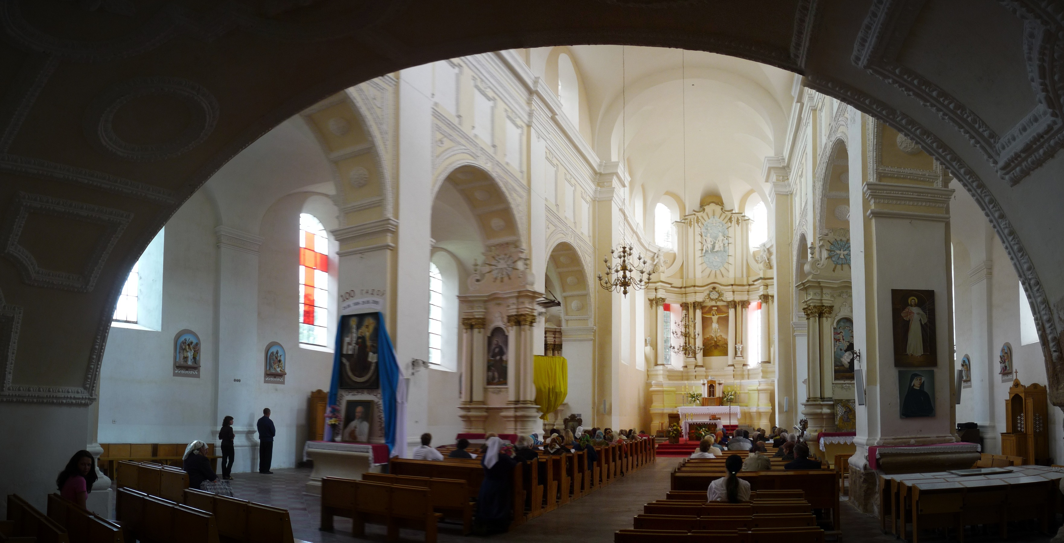 Беларуская (тарашкевіца): Ансамбль былога кляштара бэрнардынаў: Троіцкі касьцёл. Фрагмэнт дэкаратыўнай кампазыцыі ў галоўным алтары, жылы корпус, агароджа з брамай. г. п. Друя